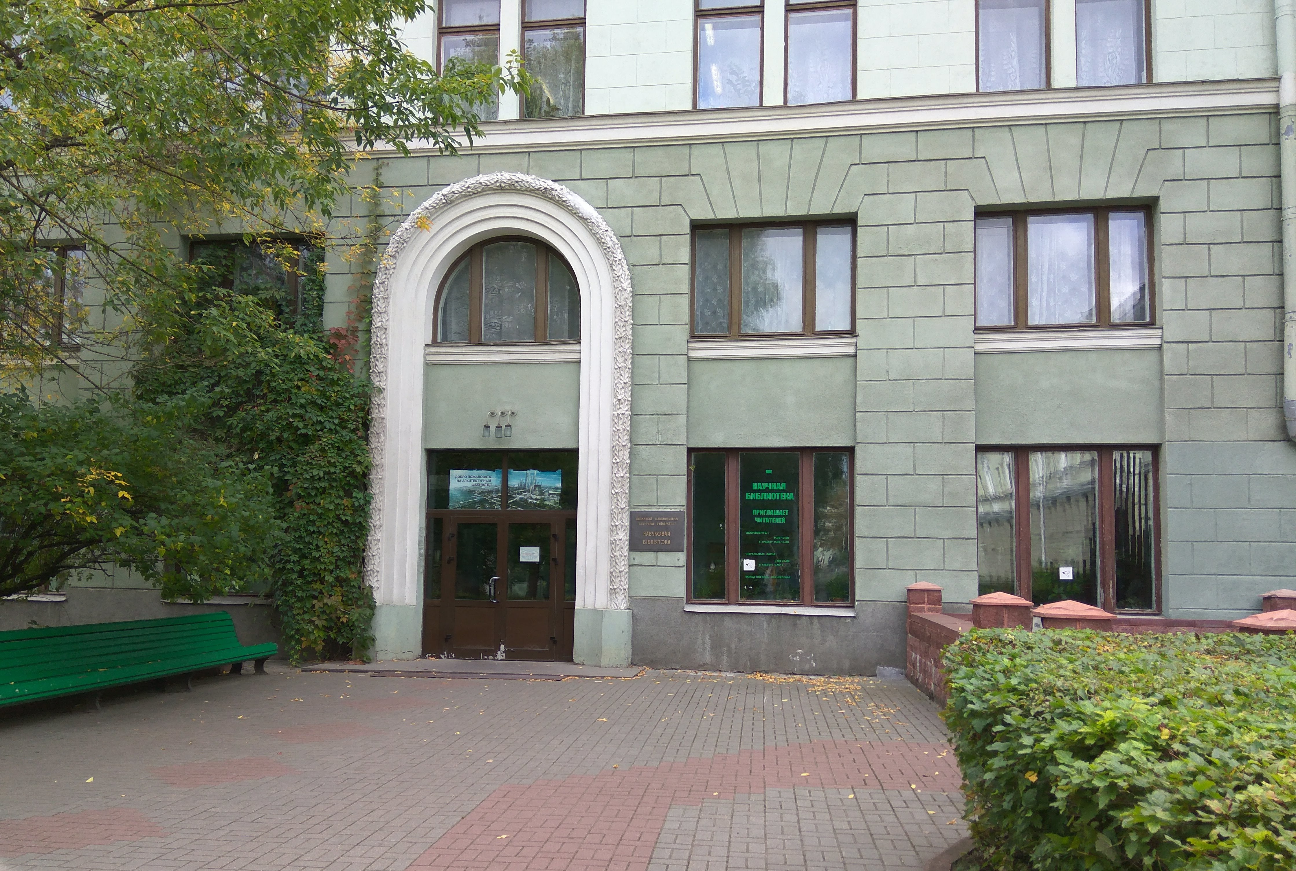 Мінск. Архітэктурны факультэт БНТУ